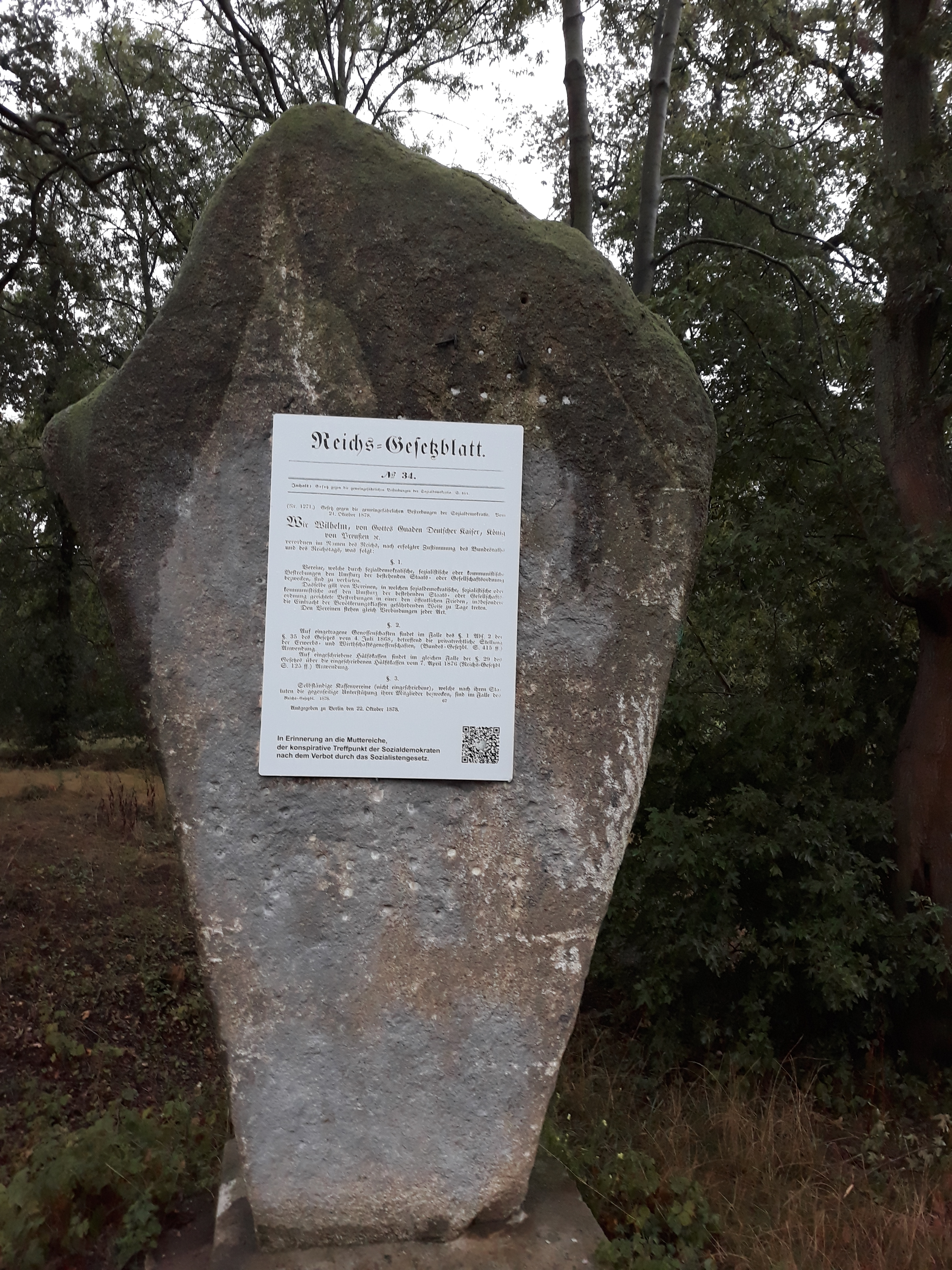 Gedenkstein Muttereiche Magdeburg 2019